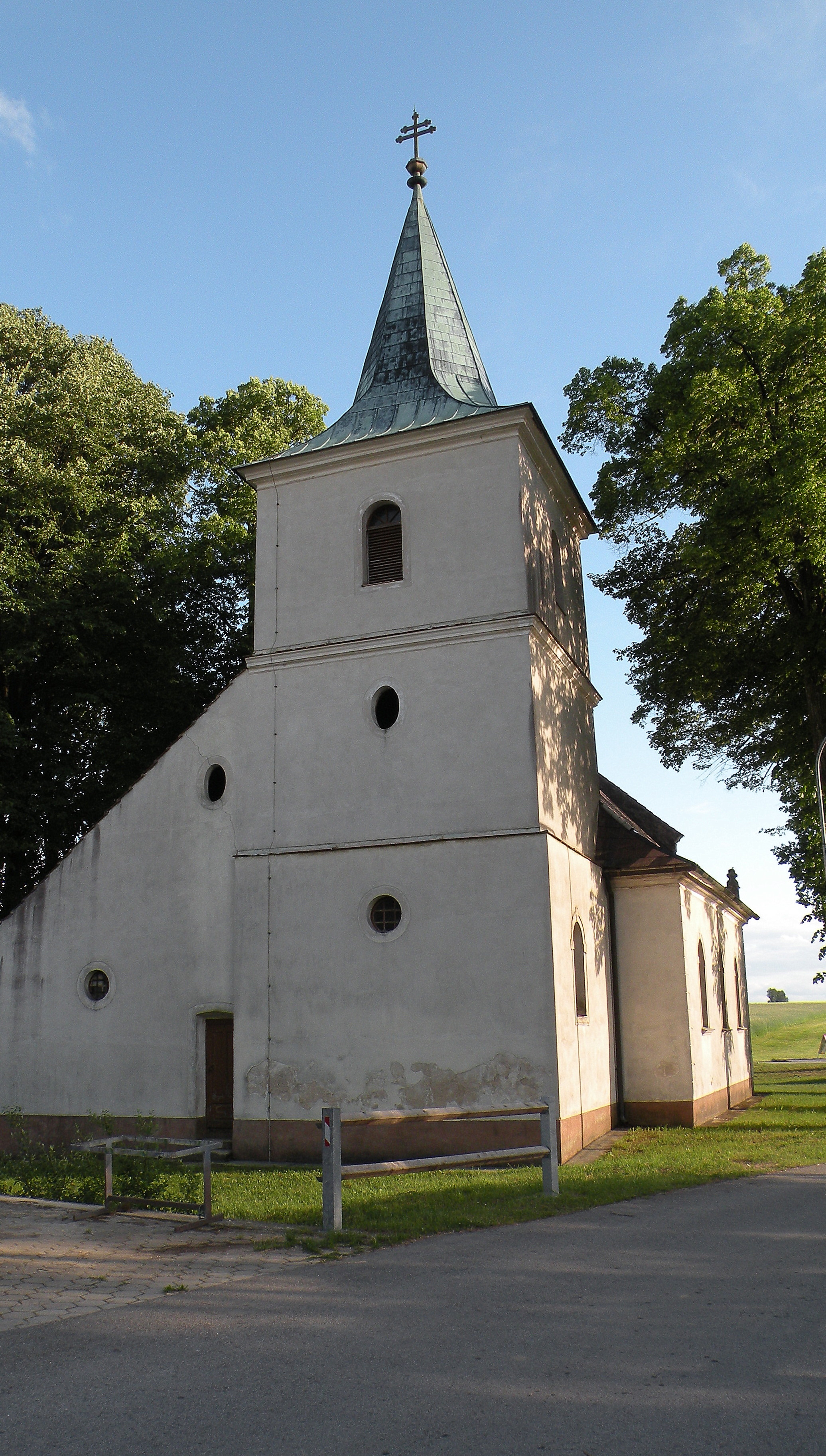 Ortskapelle in Eberweis in der Stadtgemeinde Heidenreichstein